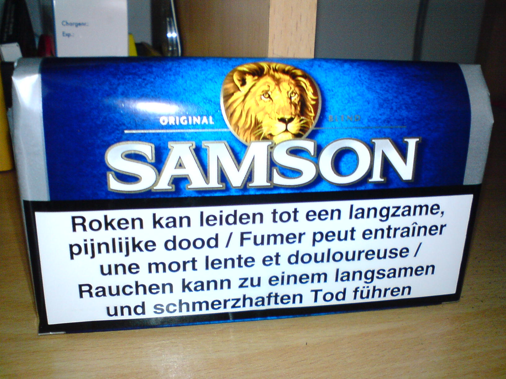 Mijn buil halfzware shag van Samson